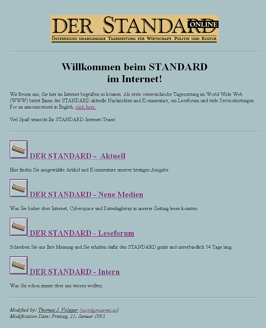 Screenshot der ersten Onlineversion von derstandard.at aus dem Jahr 1995